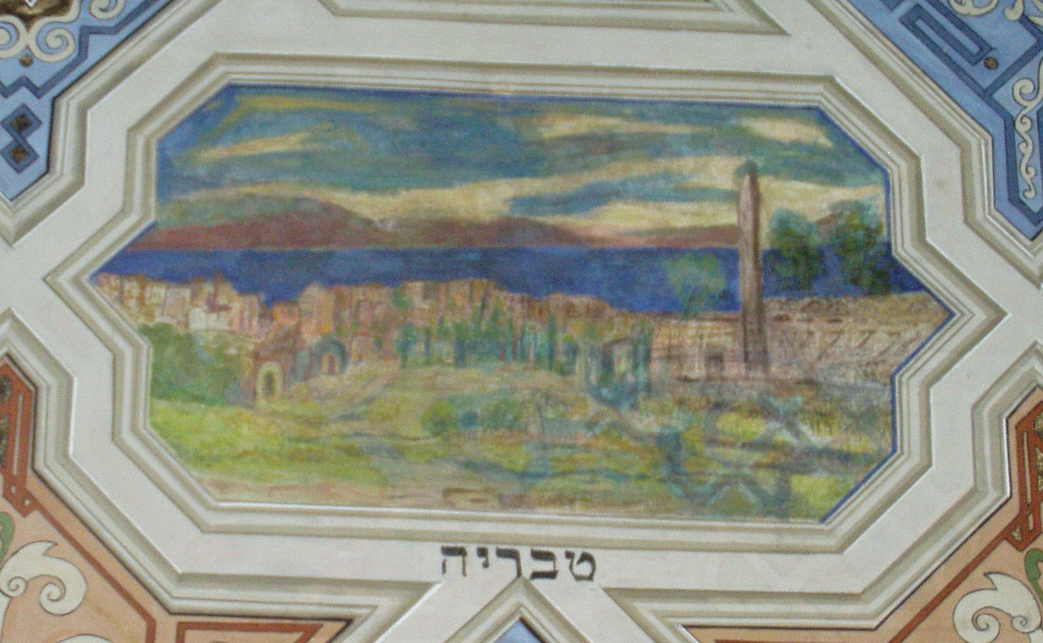 Sceny biblijne na stropie synagogi Kupa w Krakowie